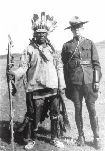 GRC réserve